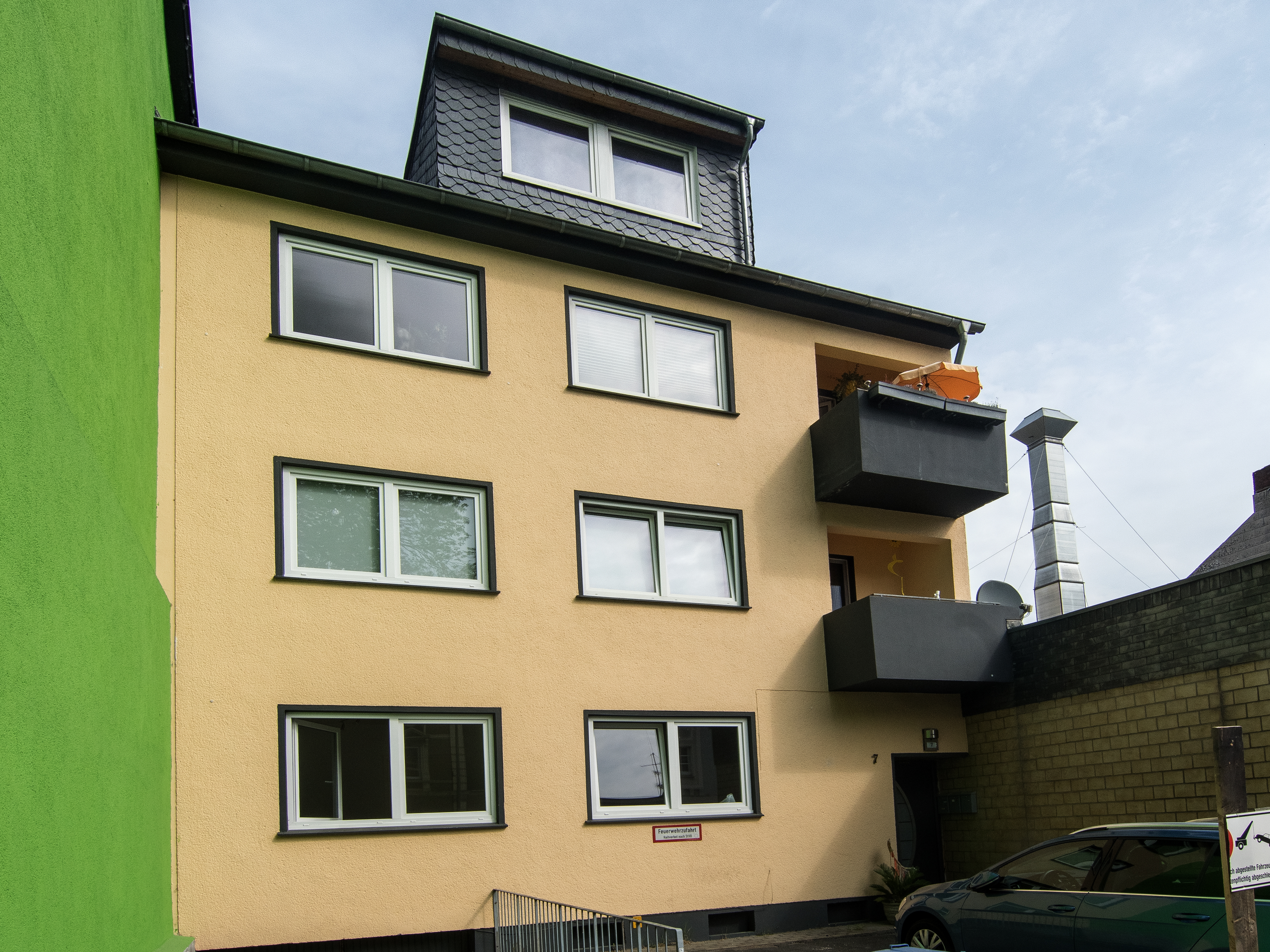 Wohnhaus von Betty und Philipp Harf in Dortmund